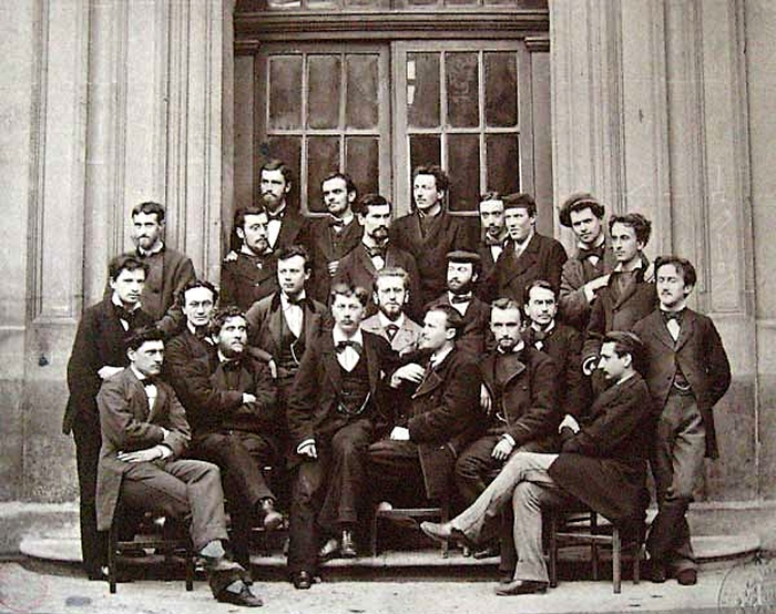 Groupe d'étudiant à l'école normale supérieure, rue d'Ulm à Paris. Promotion de 1878, Bergson, Jaurès, Desjardins etc... photo de Pierre Petit.